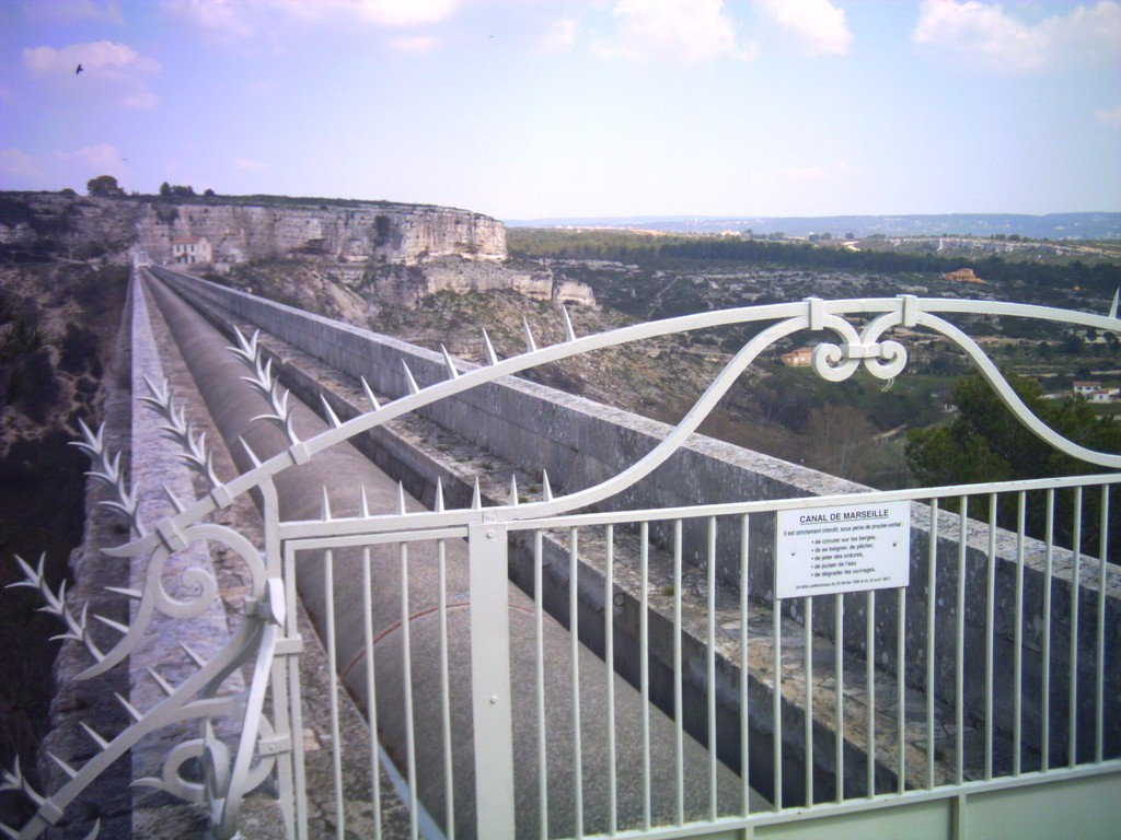 La conduite sur l'aqueduc de Roquefavour